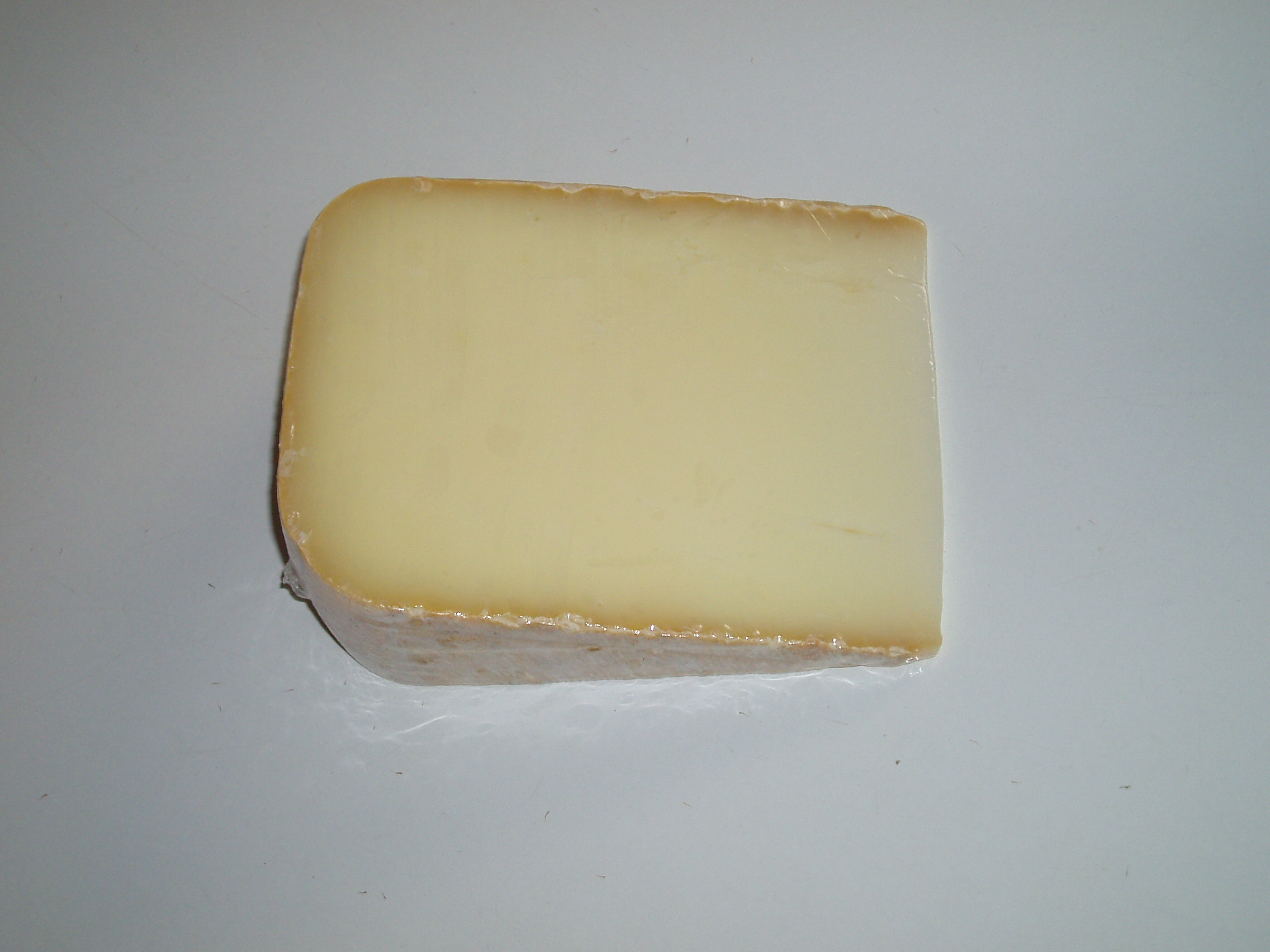 Ossau Irati sheep cheese